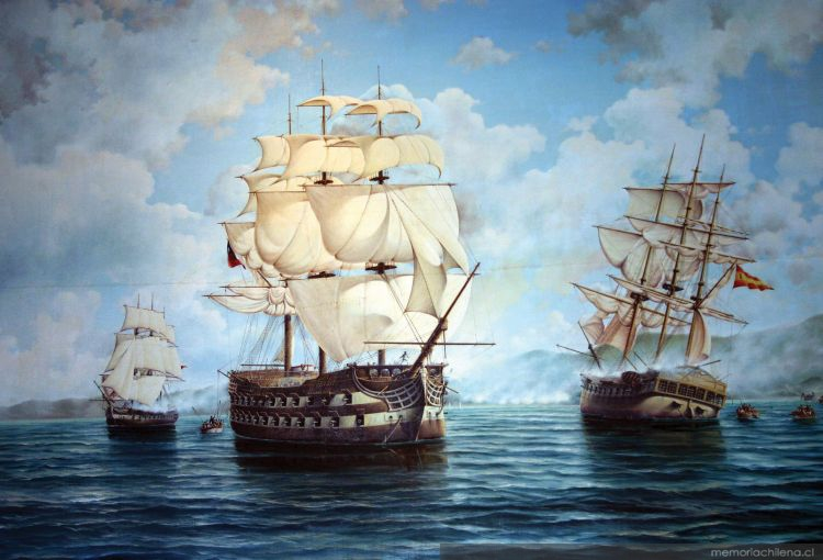 Captura de la fragata María Isabel el 17 de noviembre de 1818